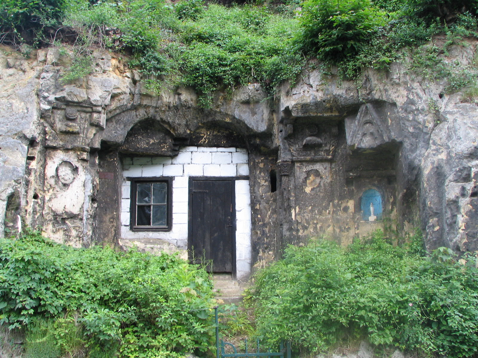 Rotswoning met versiering; Geulhem gemeente Valkenburg a/d Geul